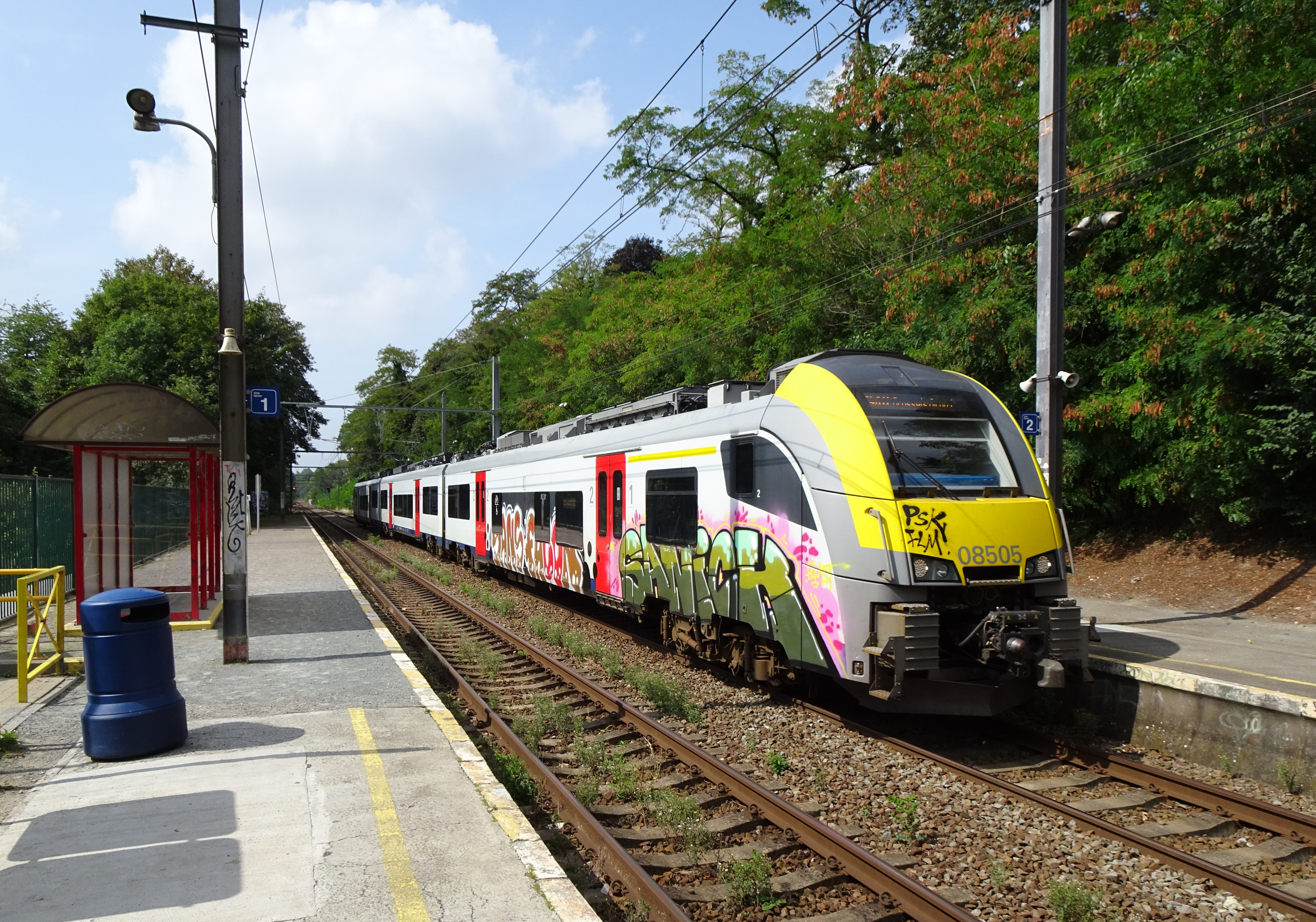 L'automotrice AM 08505 assurant le train 4011 : Charleroi-Sud - Brussels-Airport-Zaventem marque l'arrêt en gare de Saint-Job